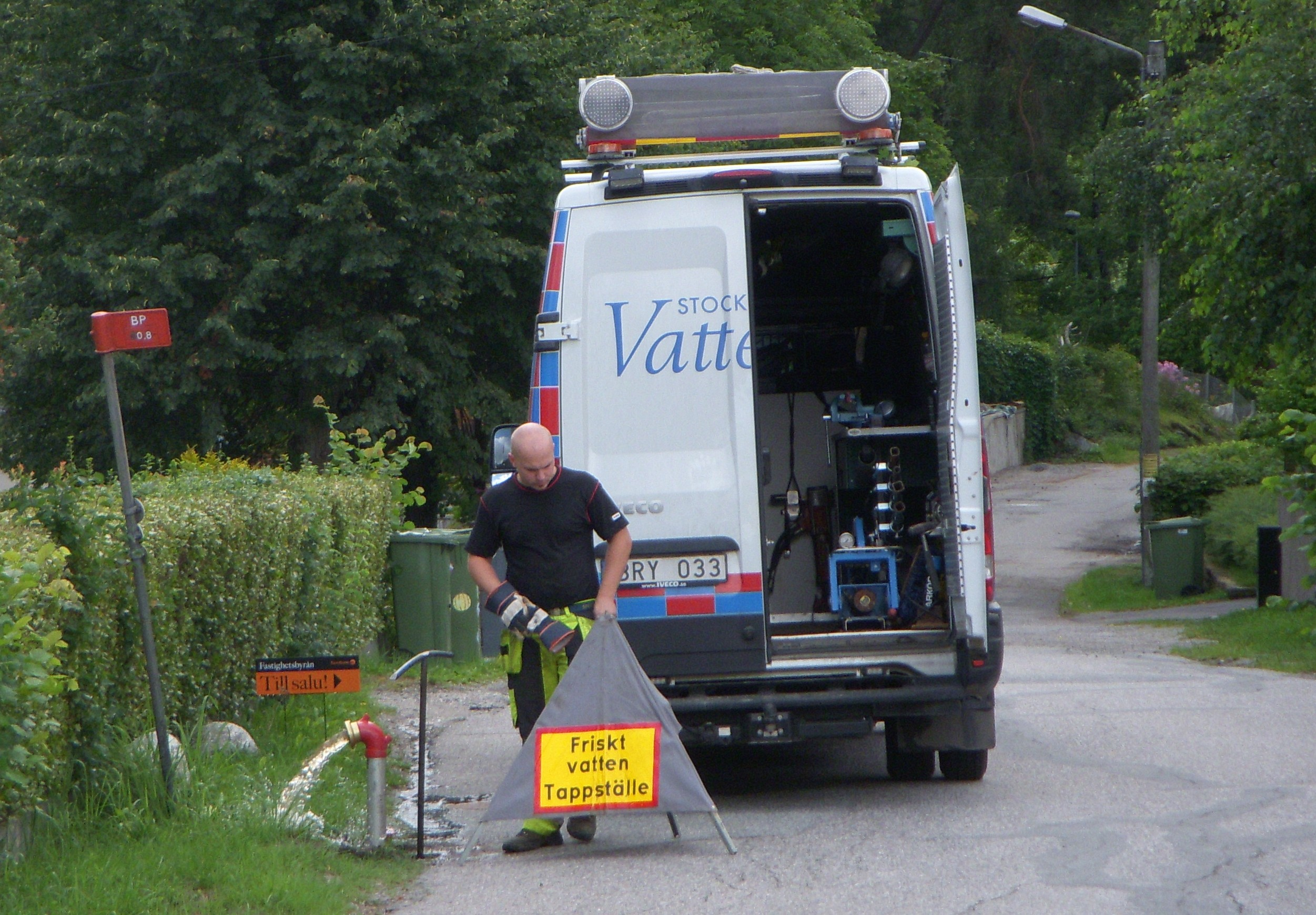 Stockholm Vattens servicebil vid uppsättning av provisorisk dricksvattentappställe